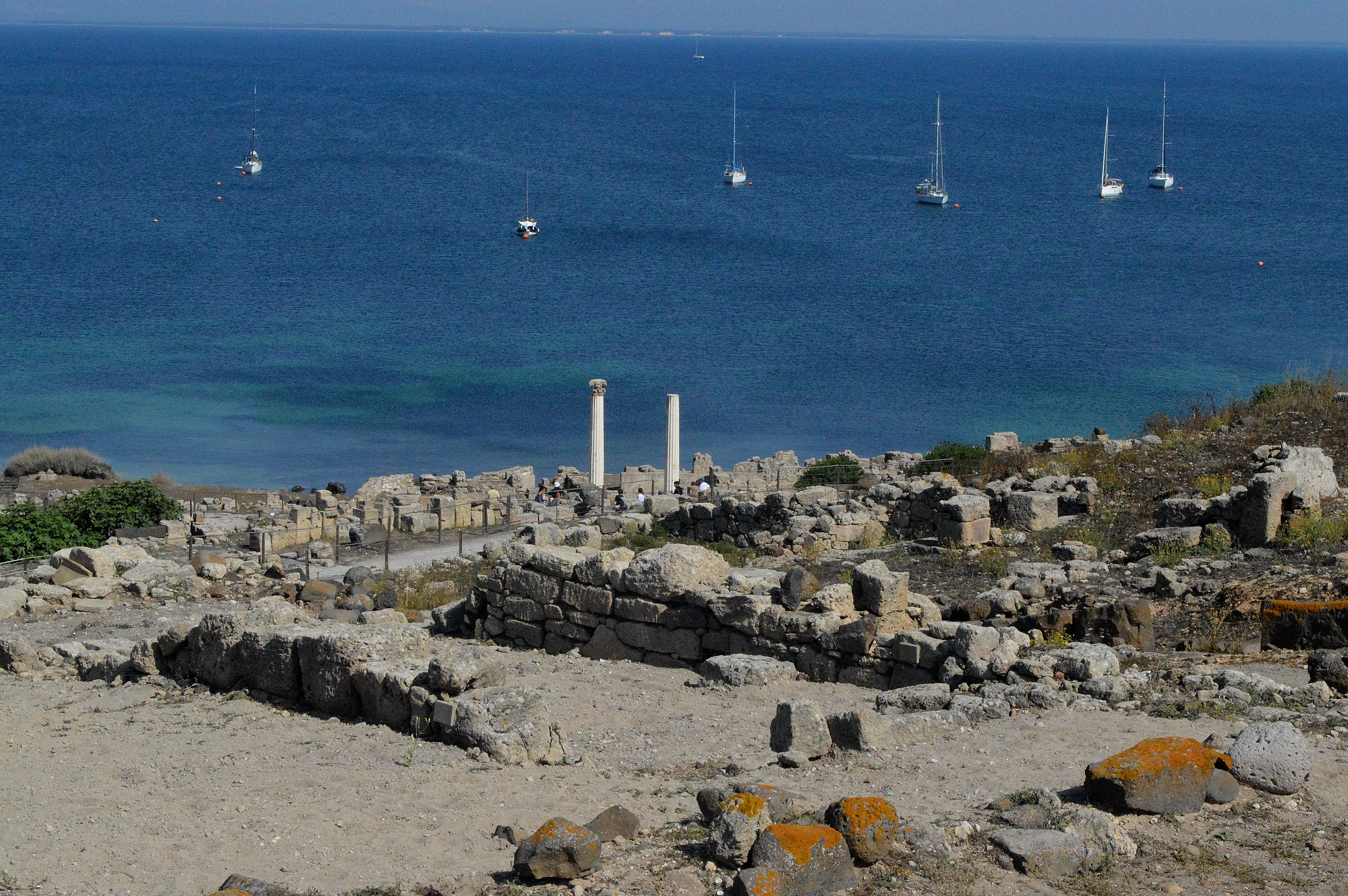 Area archeologica Tharros This is a photo of a monument which is part of cultural heritage of Italy.